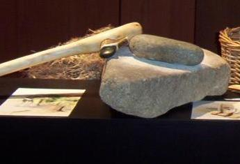 photographie prise lors d'une exposition gratuite sur le peuplement de la presqu'île de la Hague Il s'agit d'une reconstitution.